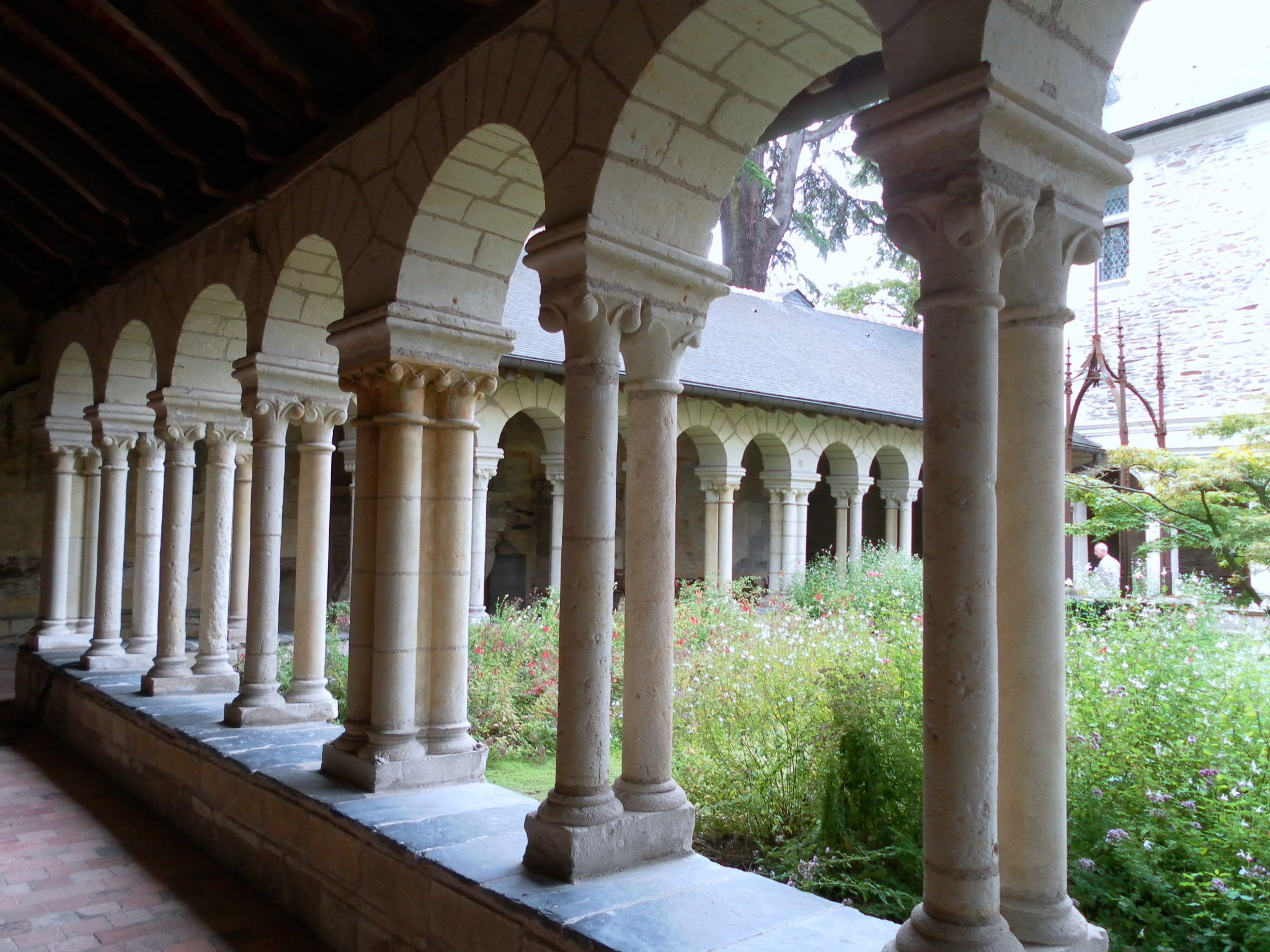 Angers, ancien hôpital Saint-Jean, vue du cloître